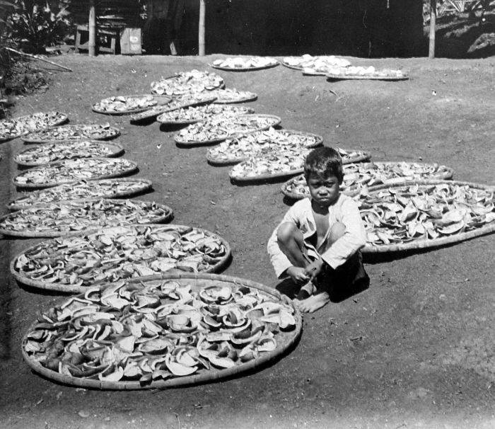 Repronegatief. Gedroogde kokos voor de bereiding van kopra